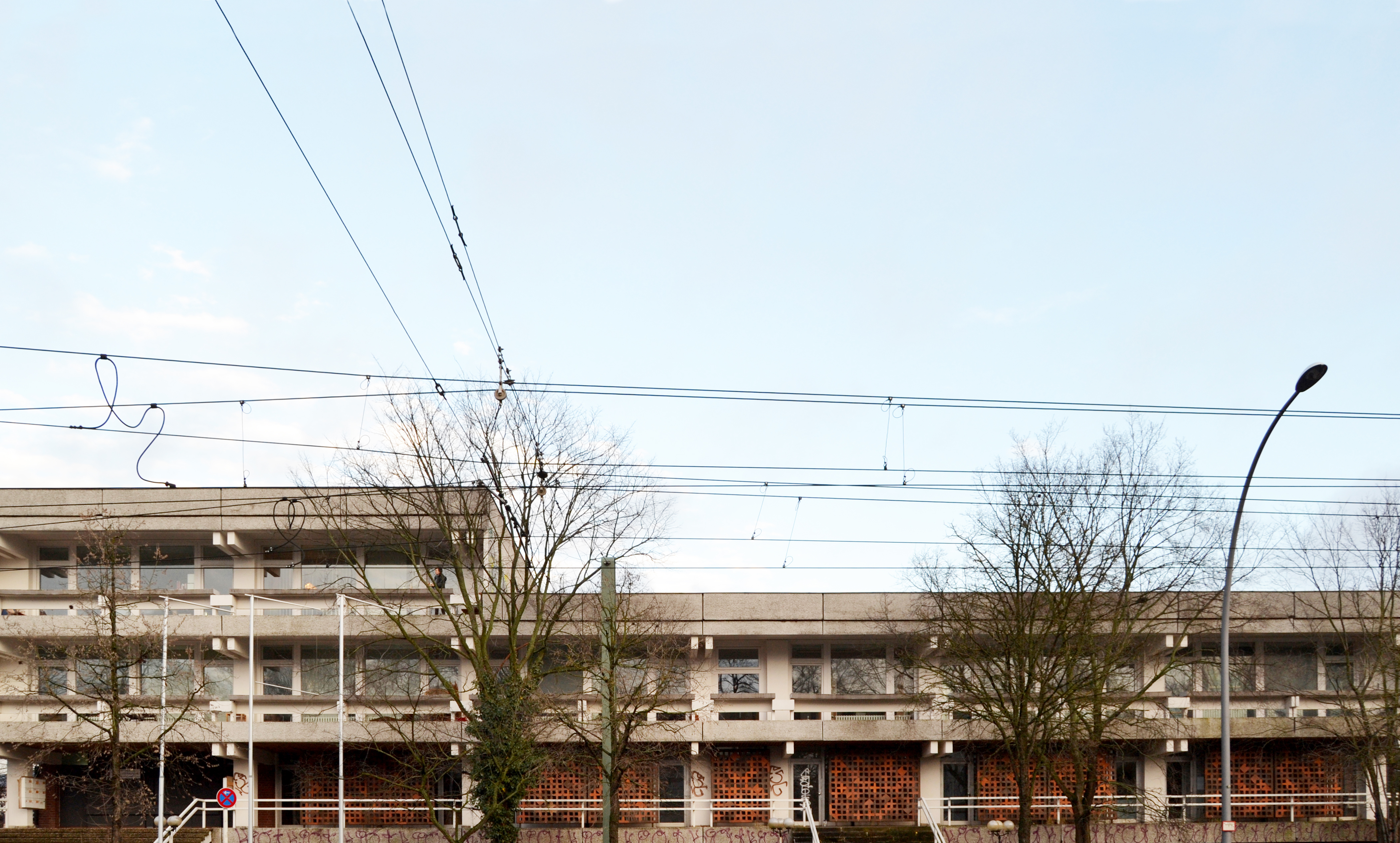 Streetfront onto Grabbeallee, Pankow